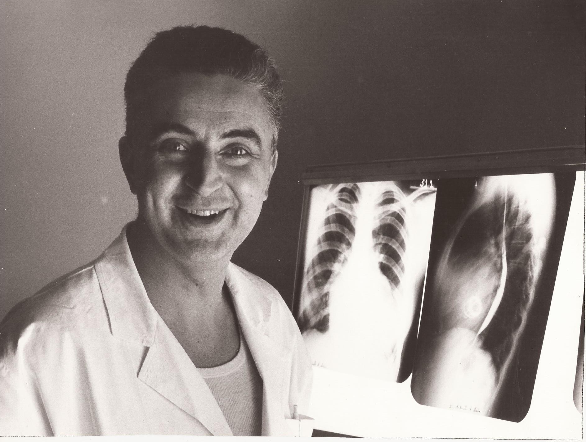 Renato Donatelli sorridente con la radiografia delle valvole cardiache